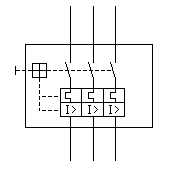 Schaltzeichen eines dreipoligen Motorschutzschalters